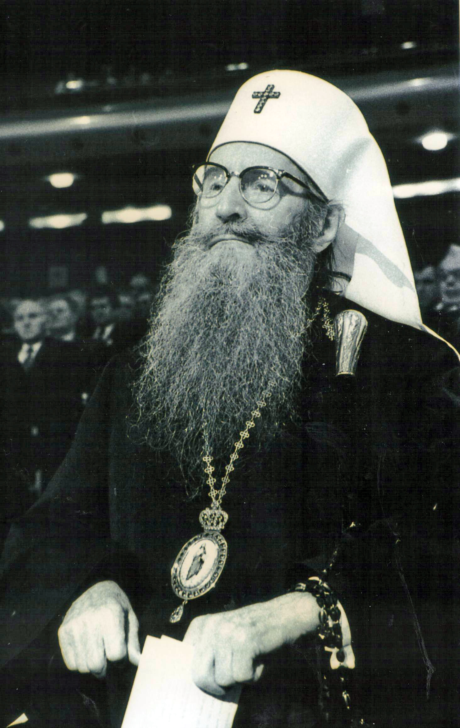 Patrijarh Srpski German by Stevan Kragujevic